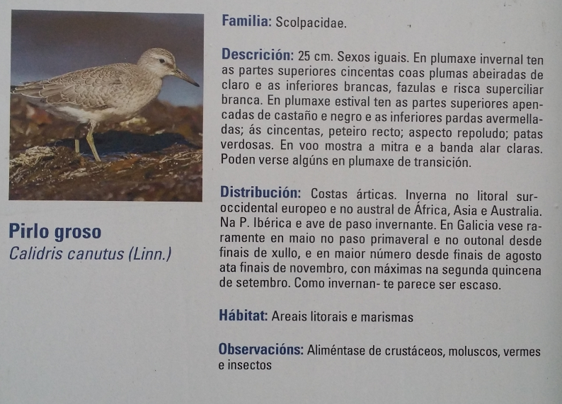 Cartaz explicativo sobre o pilro groso na vila de Caión